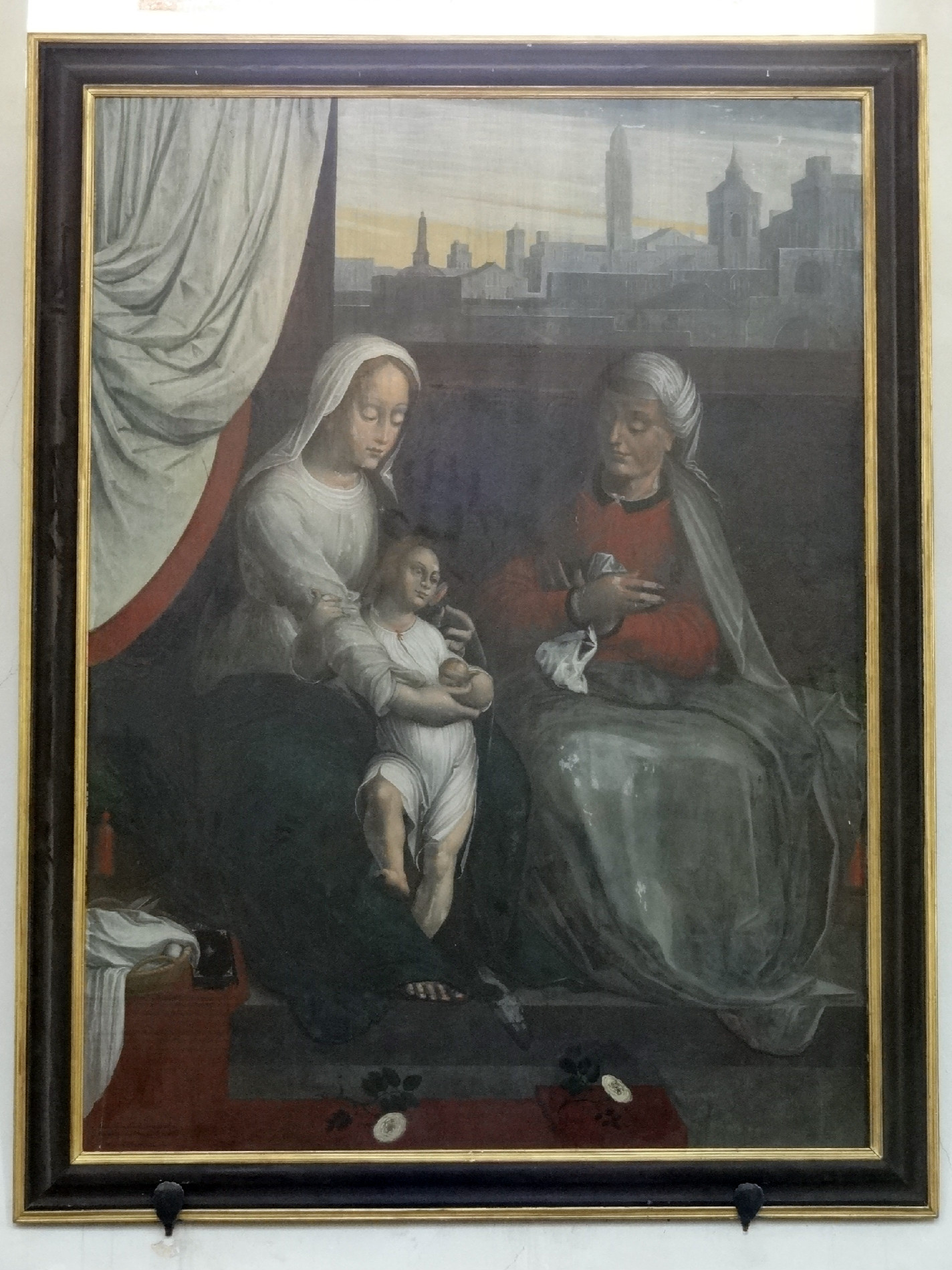 Klosterkirche (JVA Rockenberg)